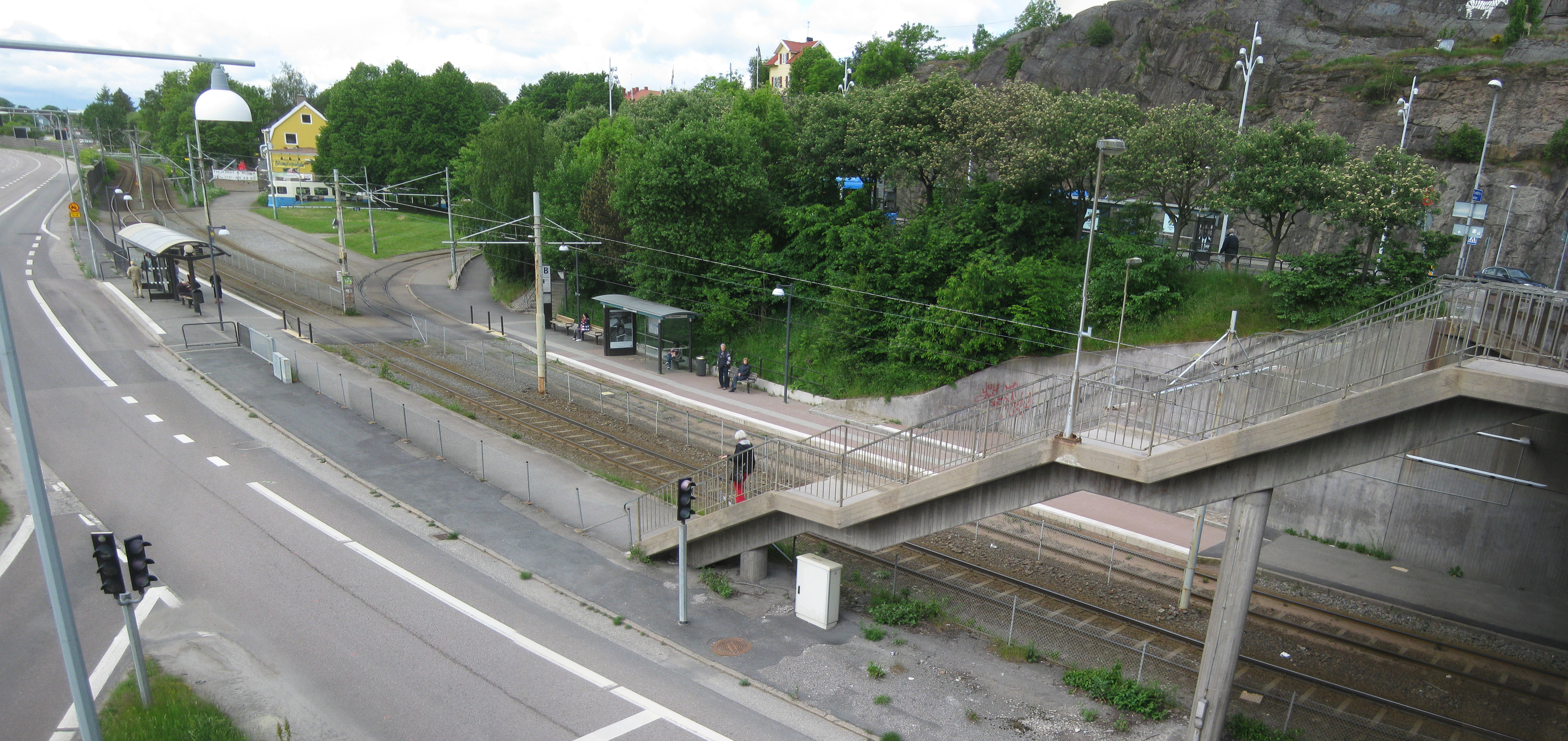 Kunggstens spårvagnshållplats, Göteborg. Bakom träden syns busshållplatsen.